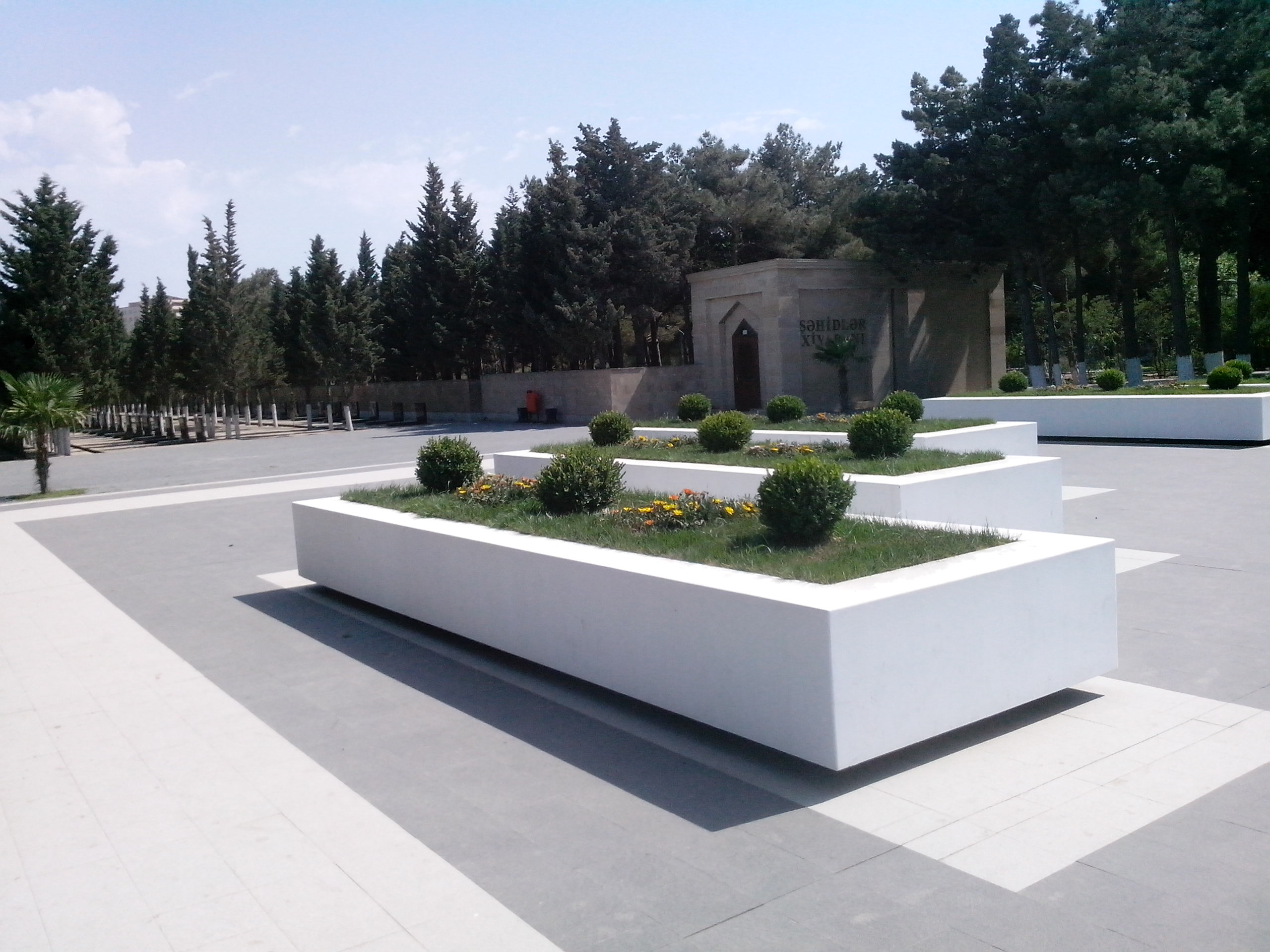 Sumqayıt Şəhidlər Xiyabanı